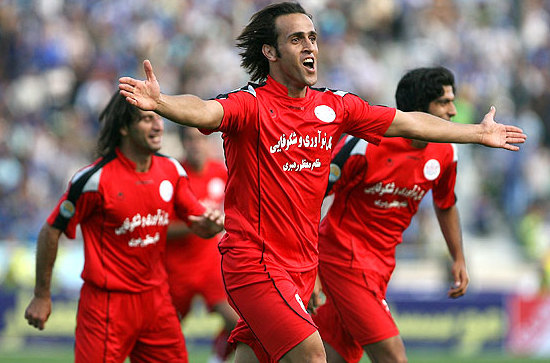 علی کریمی و شادی پس از گلزنی به استقلال در دربی ۶۵ - محمد منصوری و پژمان نوری در پشت دیده می‌شوند